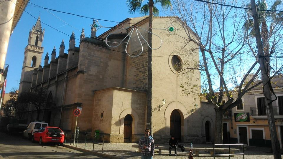 Iglesia del Barrio de La Soledad (Palma de Mallorca)